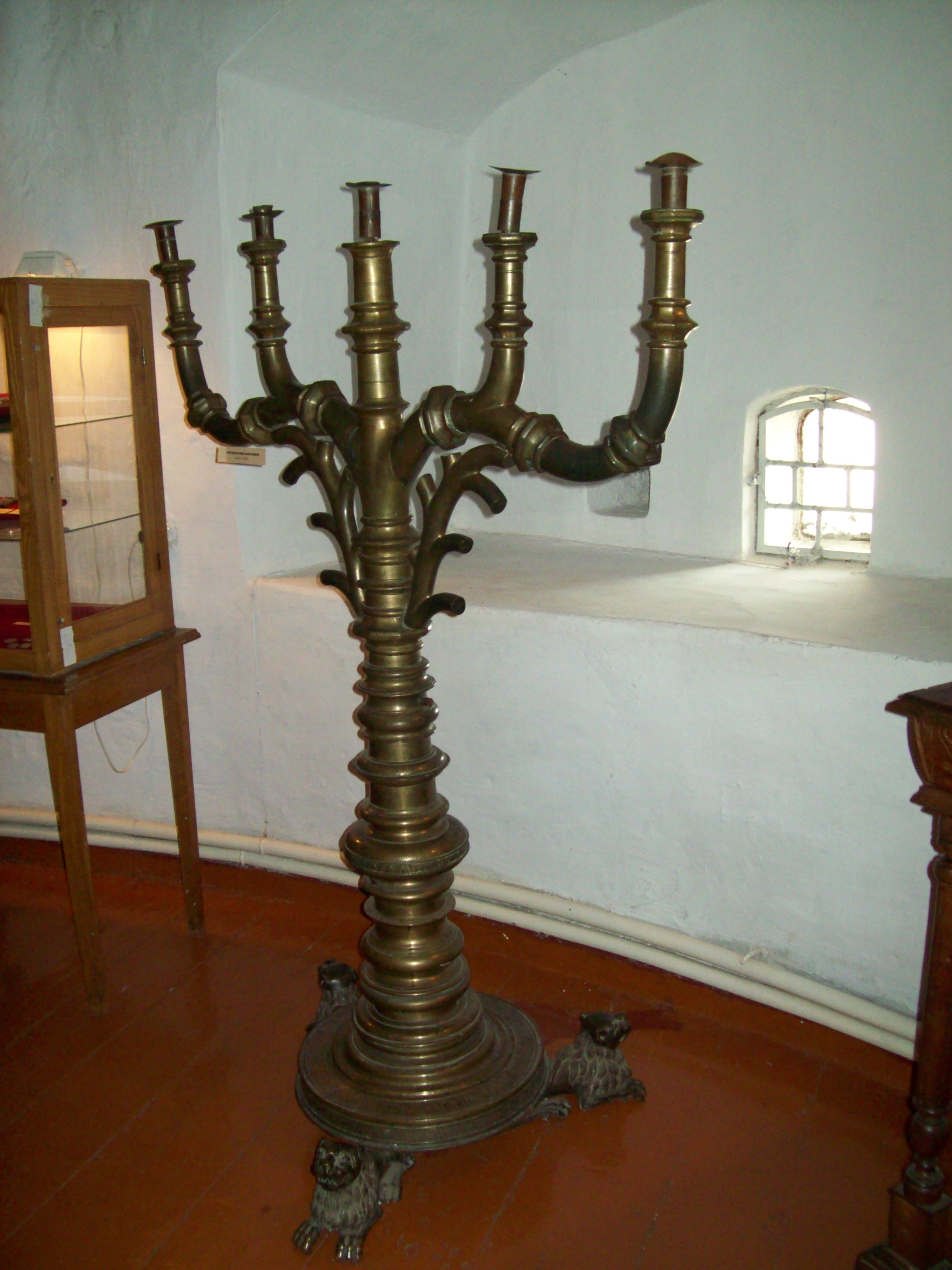 Знято фотоапаратом Kodak